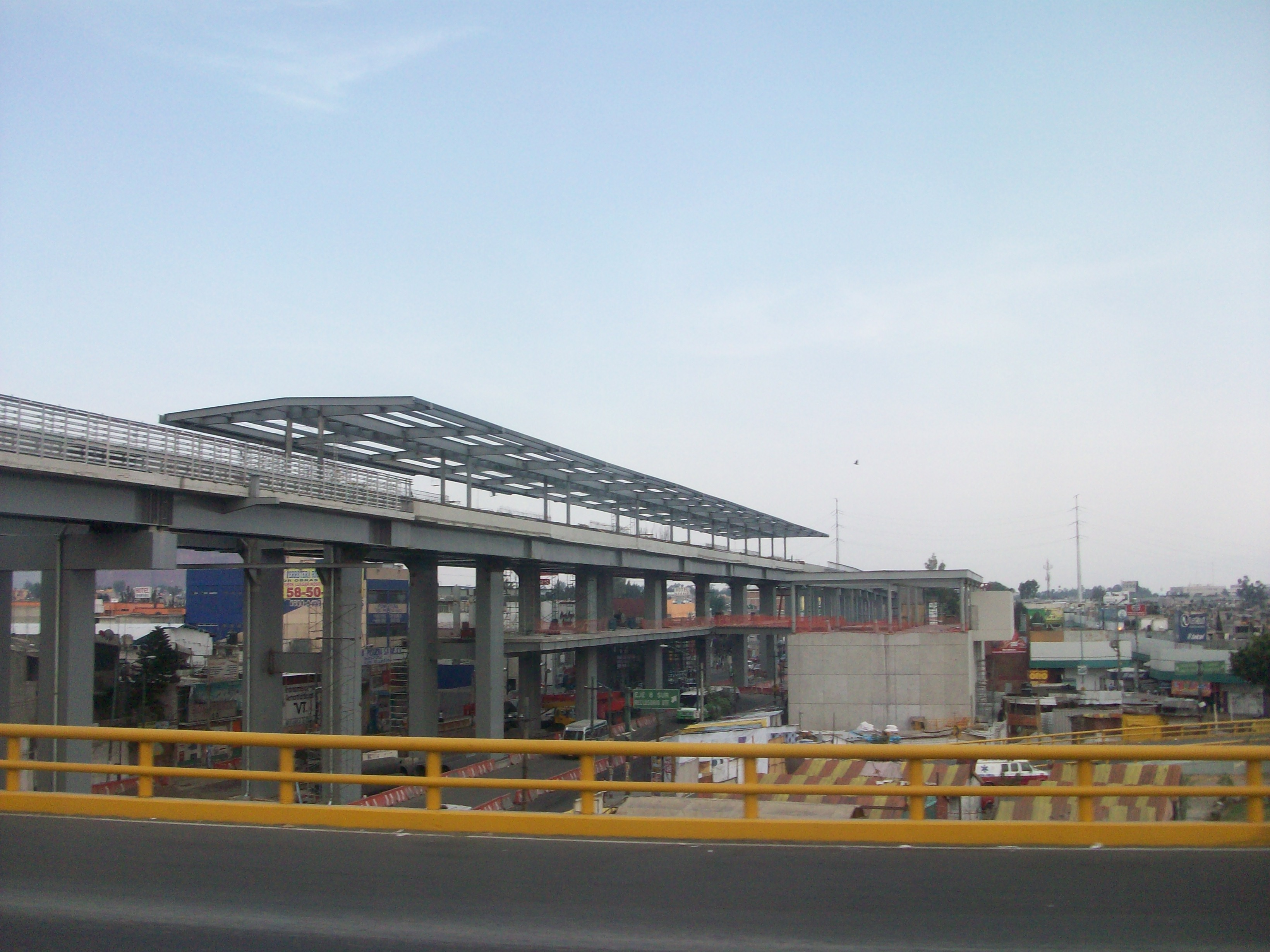 Construccion de la estacion periferico Oriente desde el Periferico